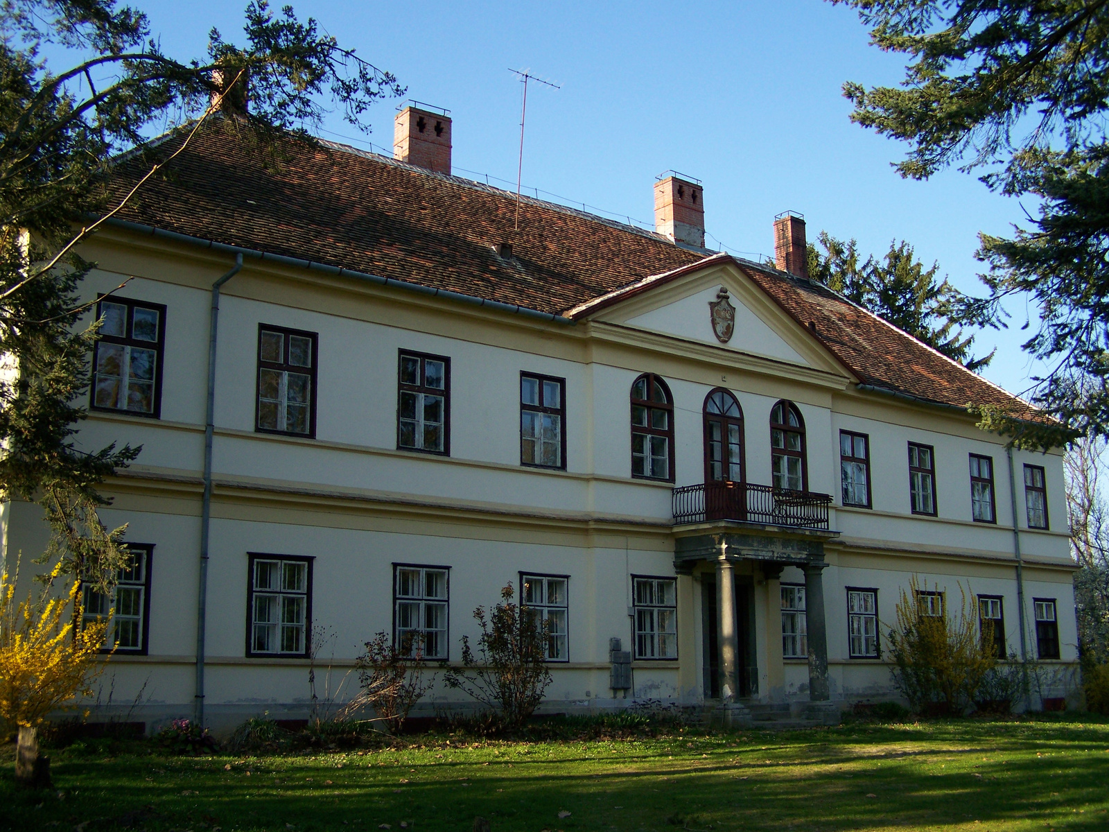 v. Sibrik-kúria (Szarvaskend, Fő u. 66 .)